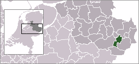 Location of Hengelo (Overijssel)